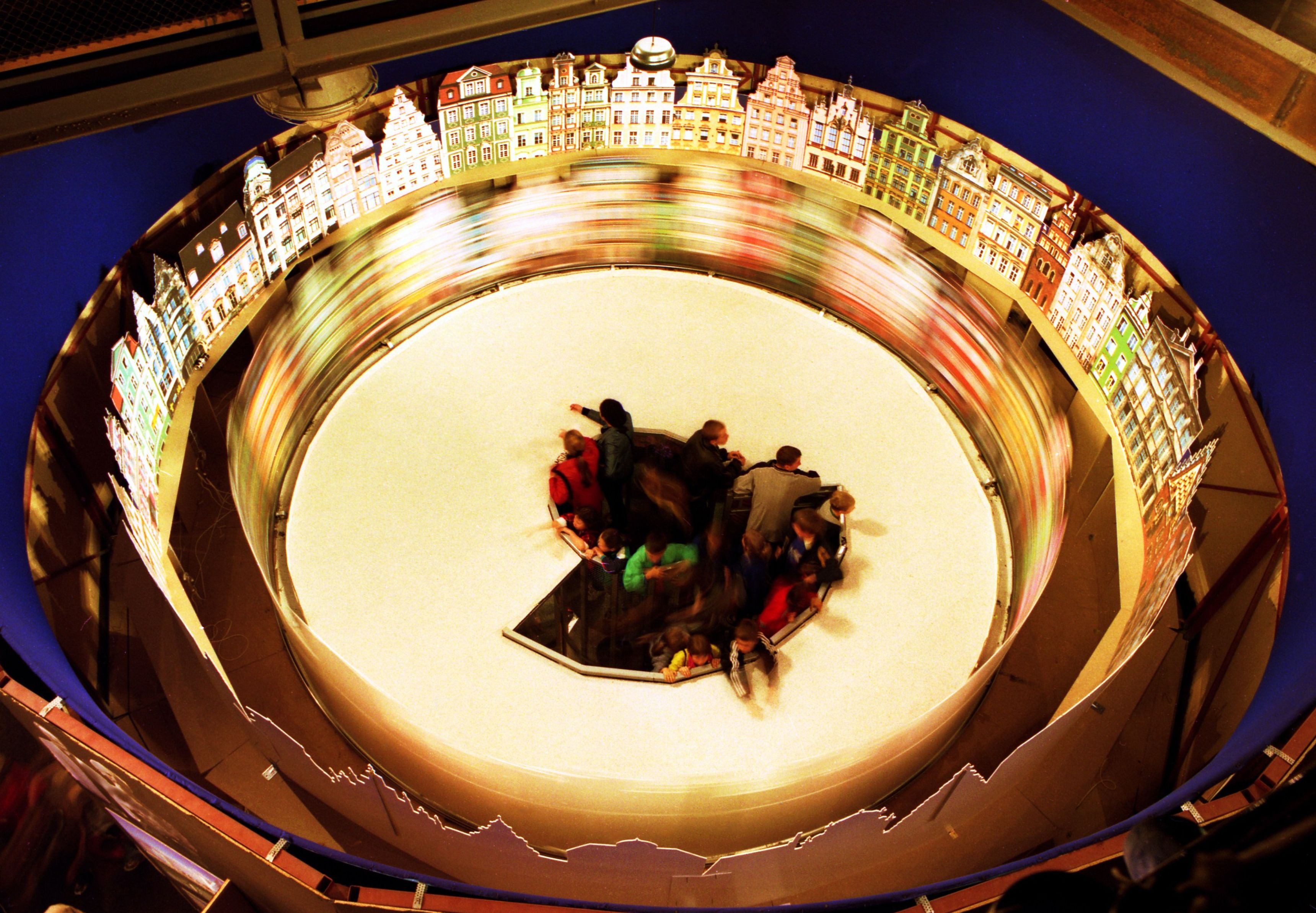 Wystawa „Wrocław 2000” - Rynek